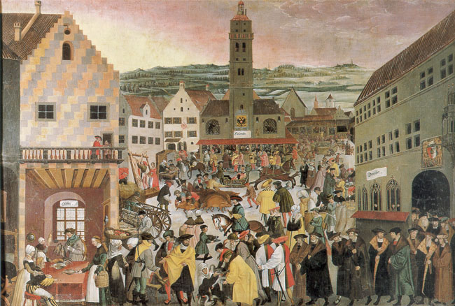 Kopie des Bildes Das um 1550 entstandene Gemälde zeigt den Perlachplatz in Augsburg. Es ist die einzig erhaltene Kopie aus dem Zyklus der vier um 1530 entstandenen Augsburger Jahreszeitengemälde